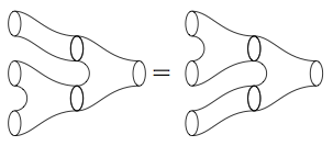 Frobenius algebra, Topologisk Kvantefeltteori: Assosiativitet af bukser